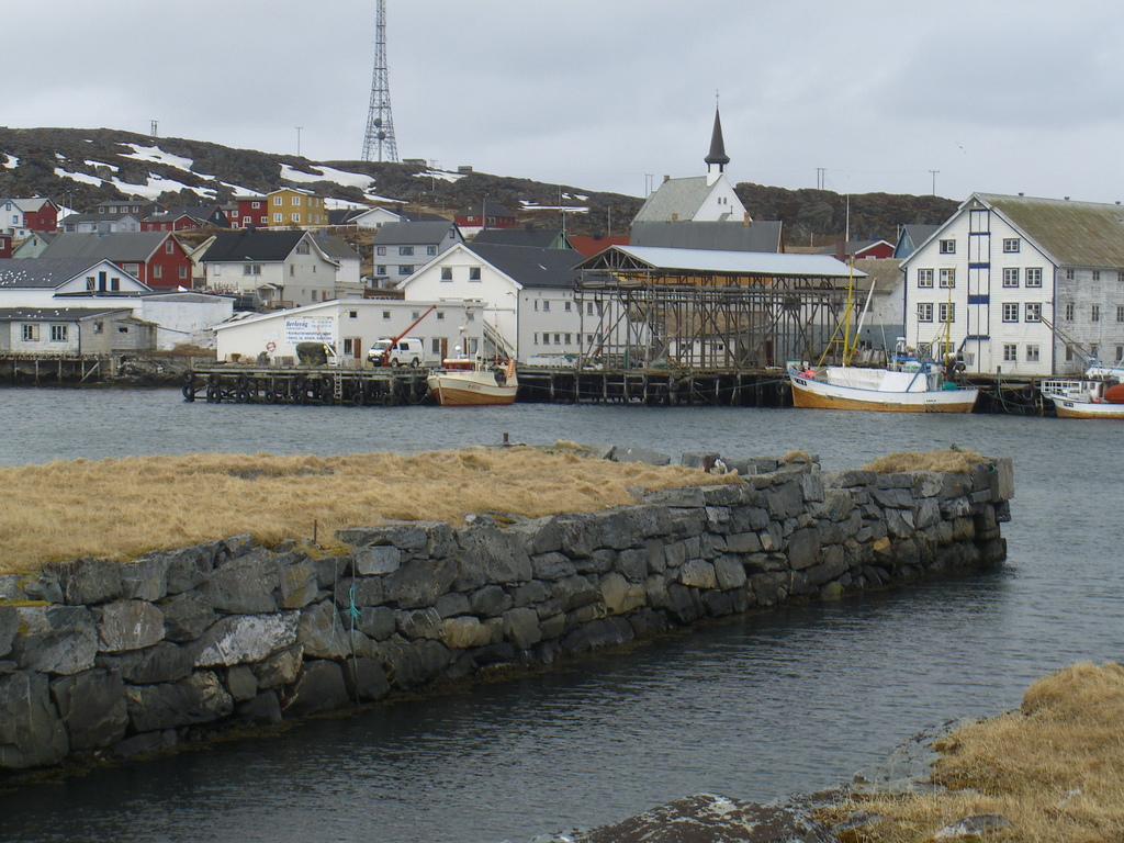 Berlevåg, Finnmark, Norway.